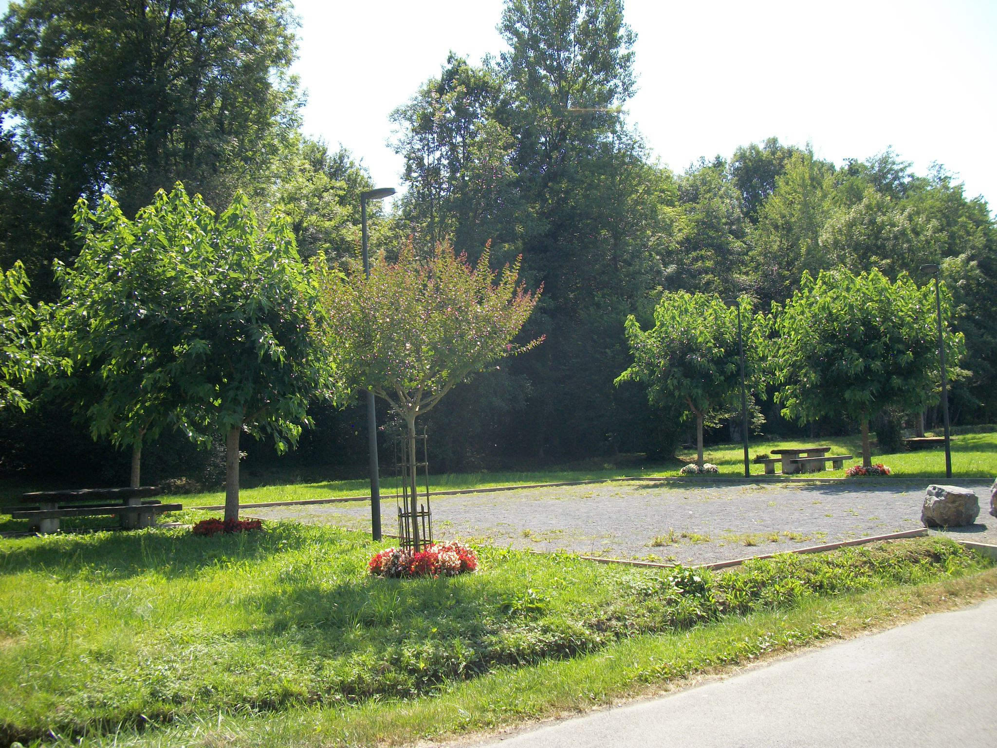 Mazères-de-Neste